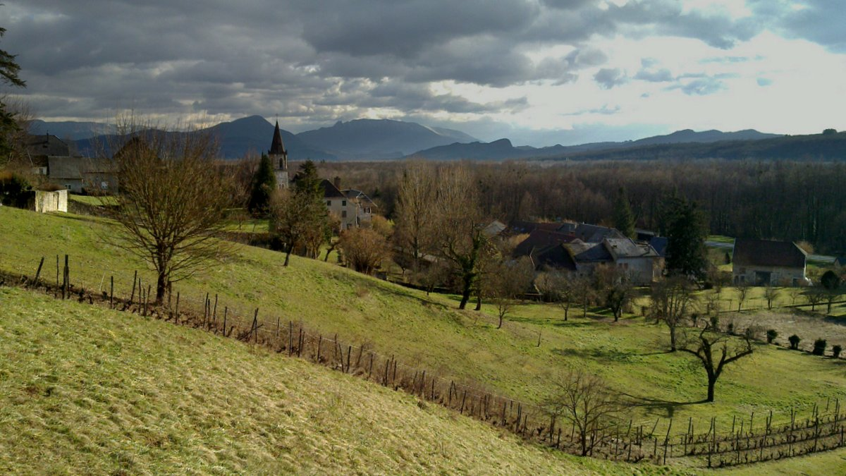 Vue générale du chef-lieu de la commune de Talissieu. Vue vers le SE. En arrière-plan, le marais de Lavours. Au fond le mont du Chat